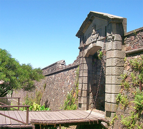 Antigua muralla de Colonia del Sacramento. Tomada en Diciembre de 2004. Categoría:América (imagen)